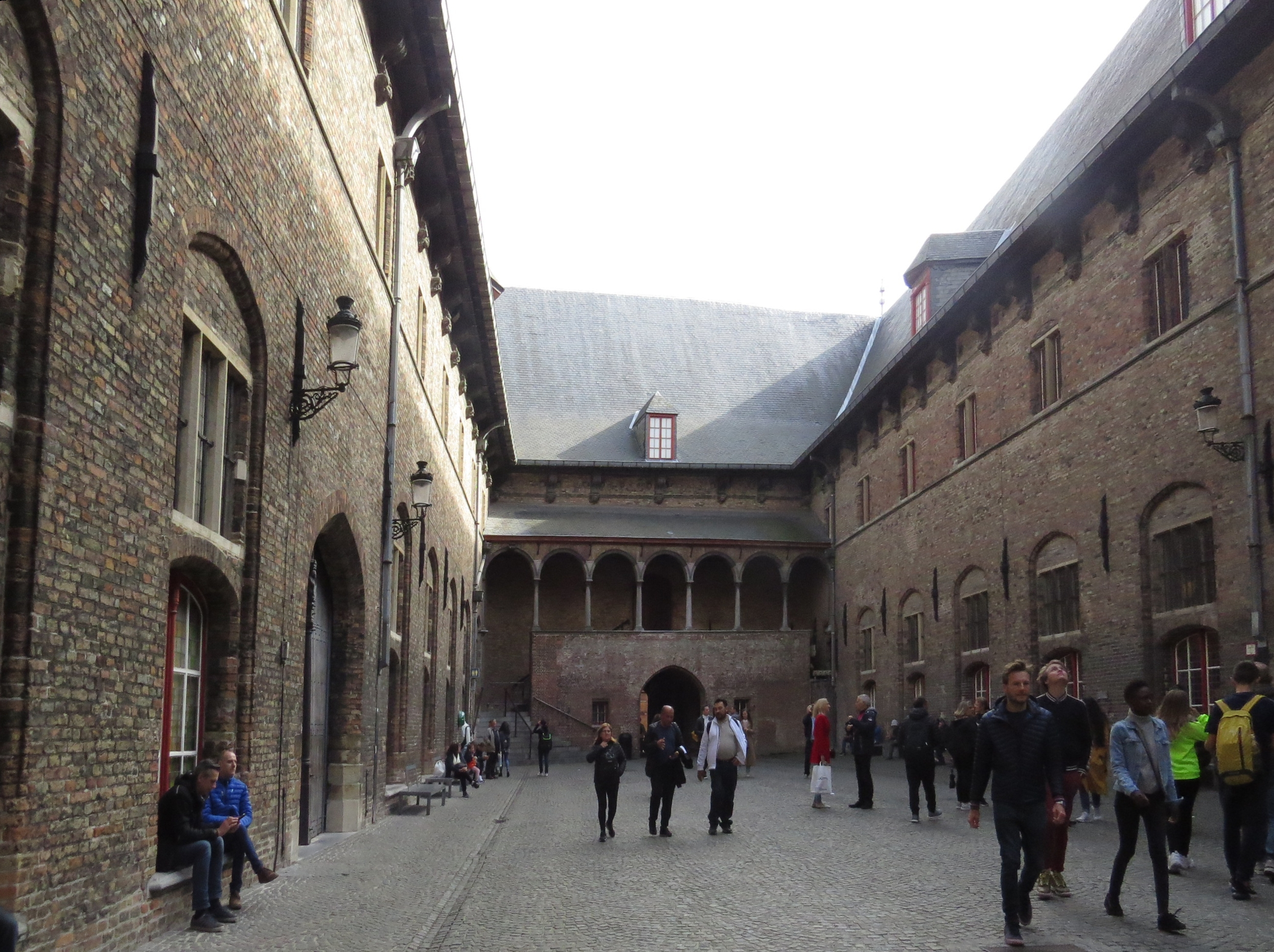 Brügge in Belgien, Ansichten vom Grote Markt